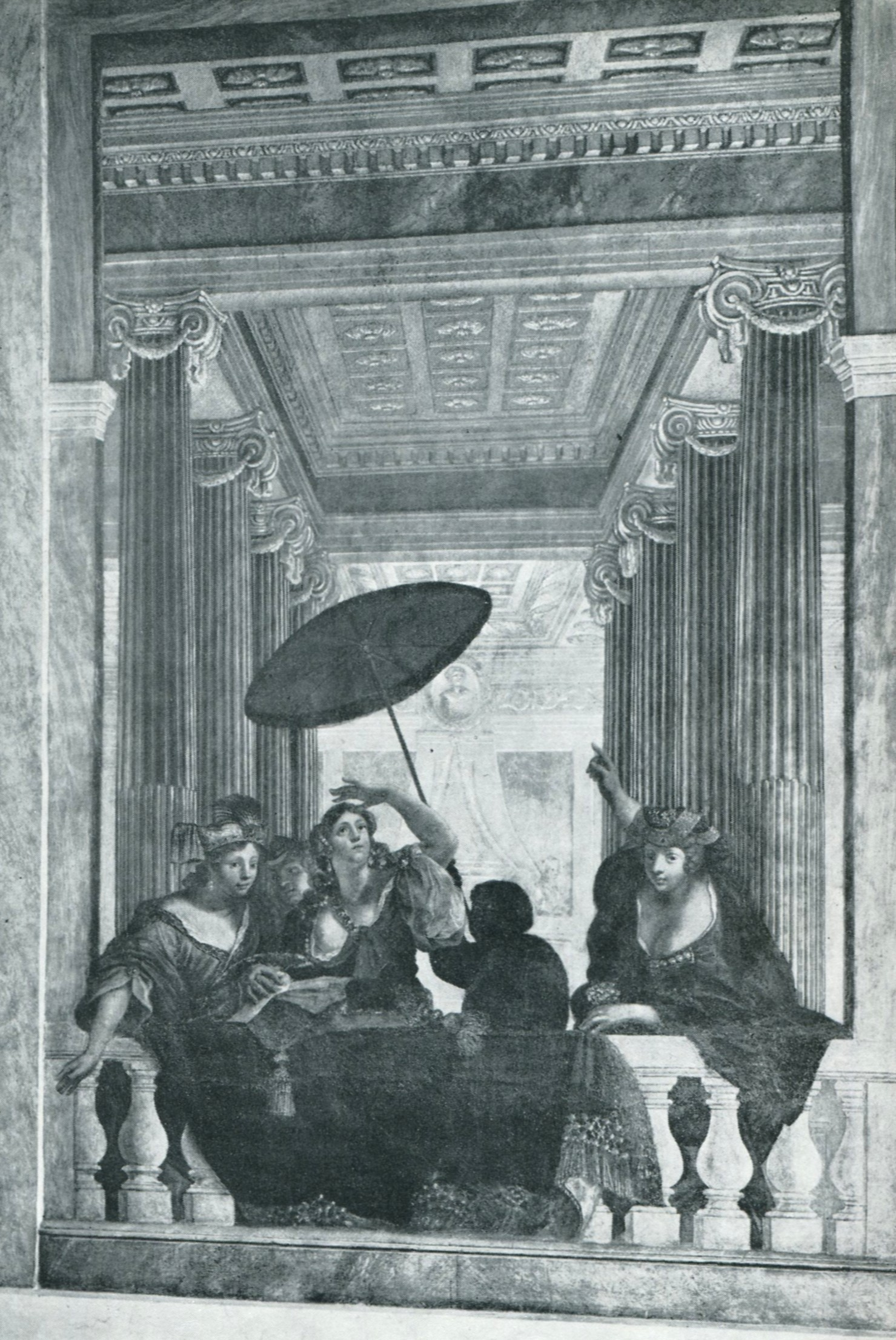 Drottningholms slott, huvudtrappan, fresk i skenperspektiv av Johan Sylvius, utförd 1686